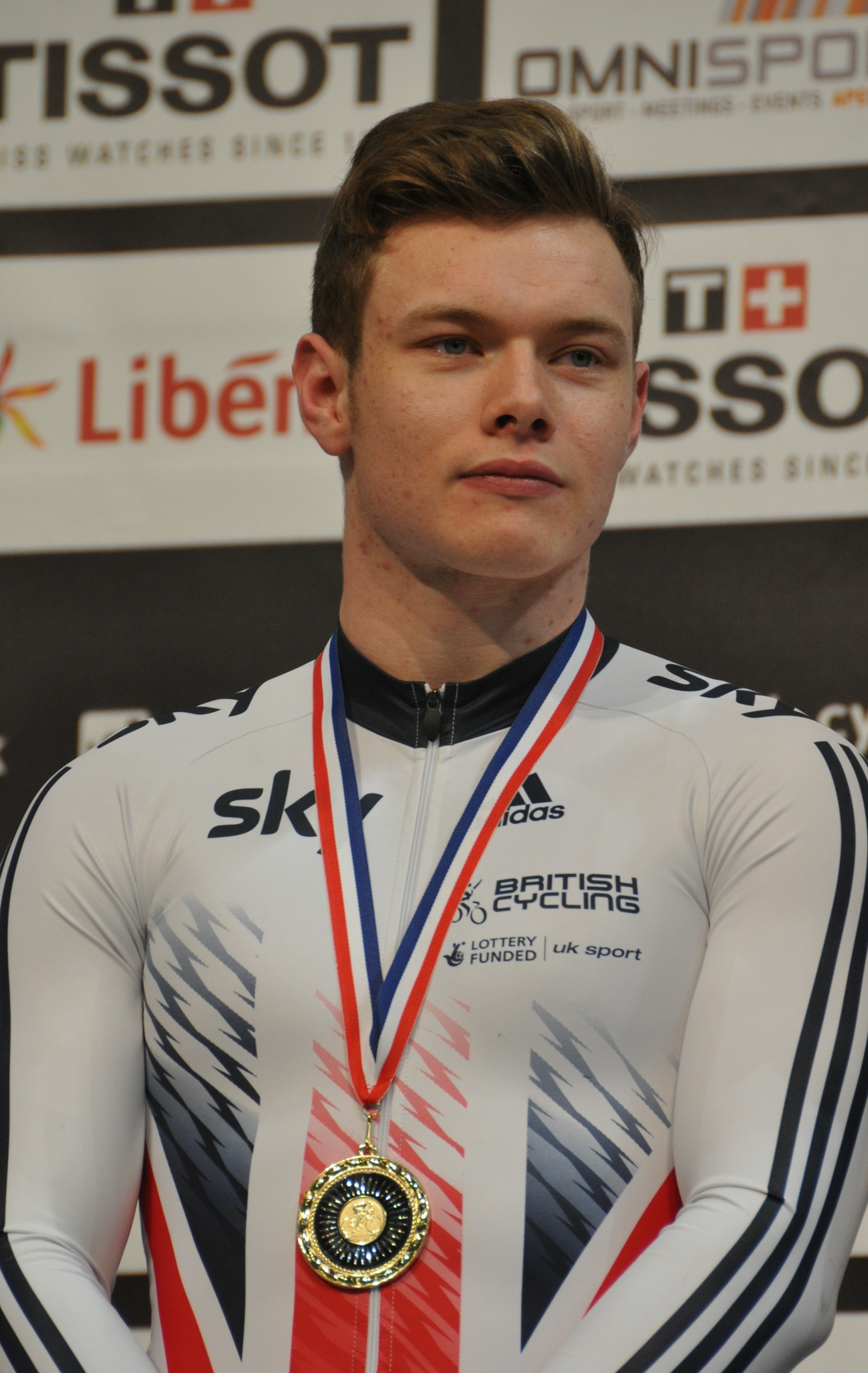 Jack Carlin, britischer Radsportler, Gold im Teamspritn